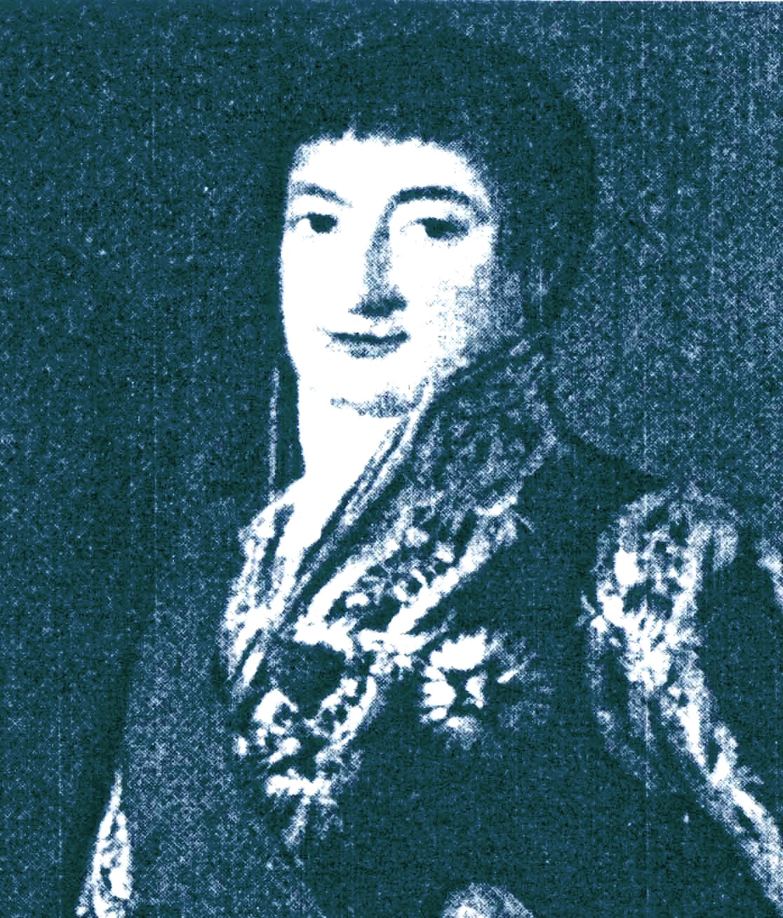 Domingo de Cabarrús y Galabert Descendance de Jean de Fourcade